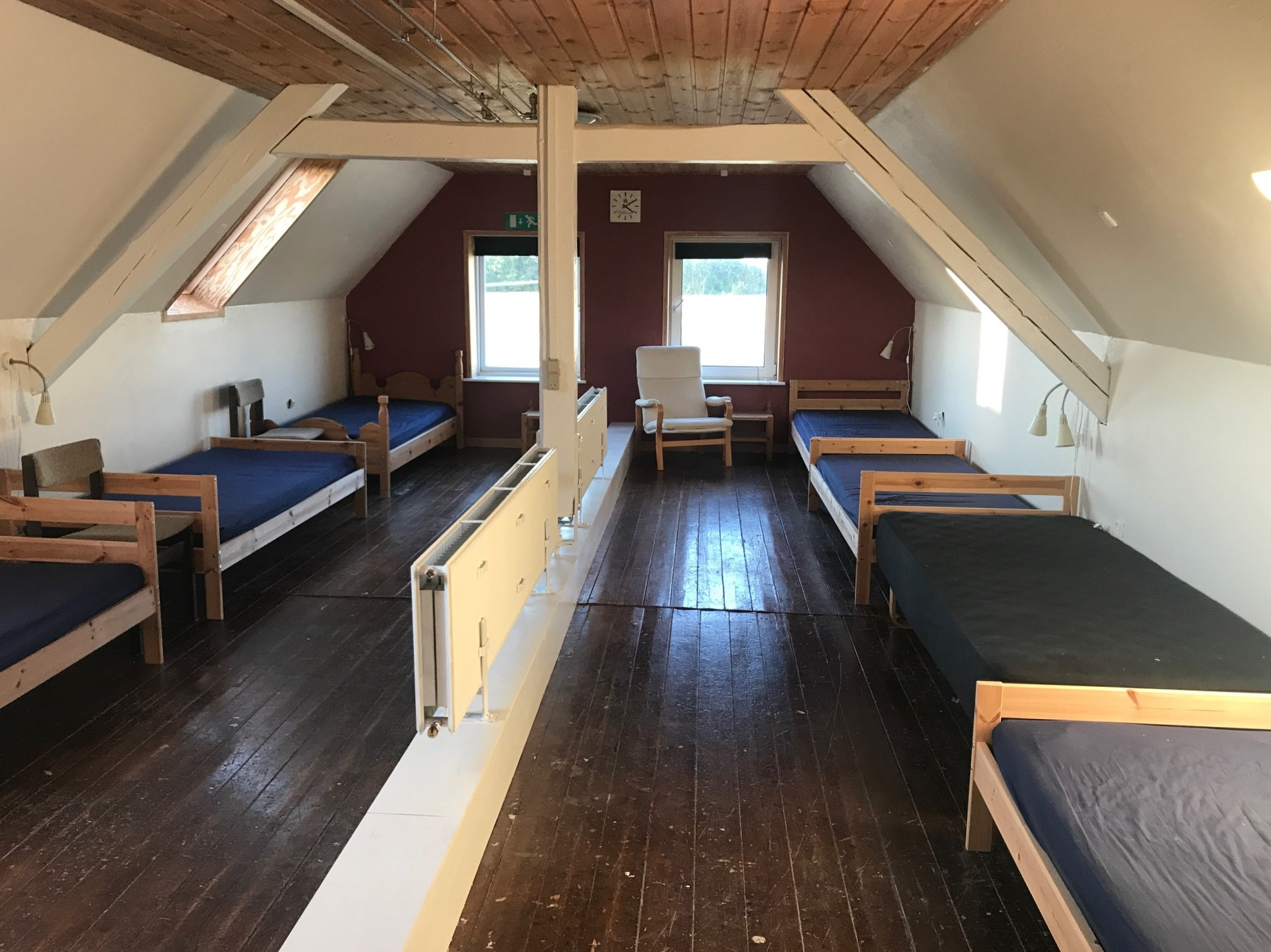 Interior del albergue de Haervejen en Skals